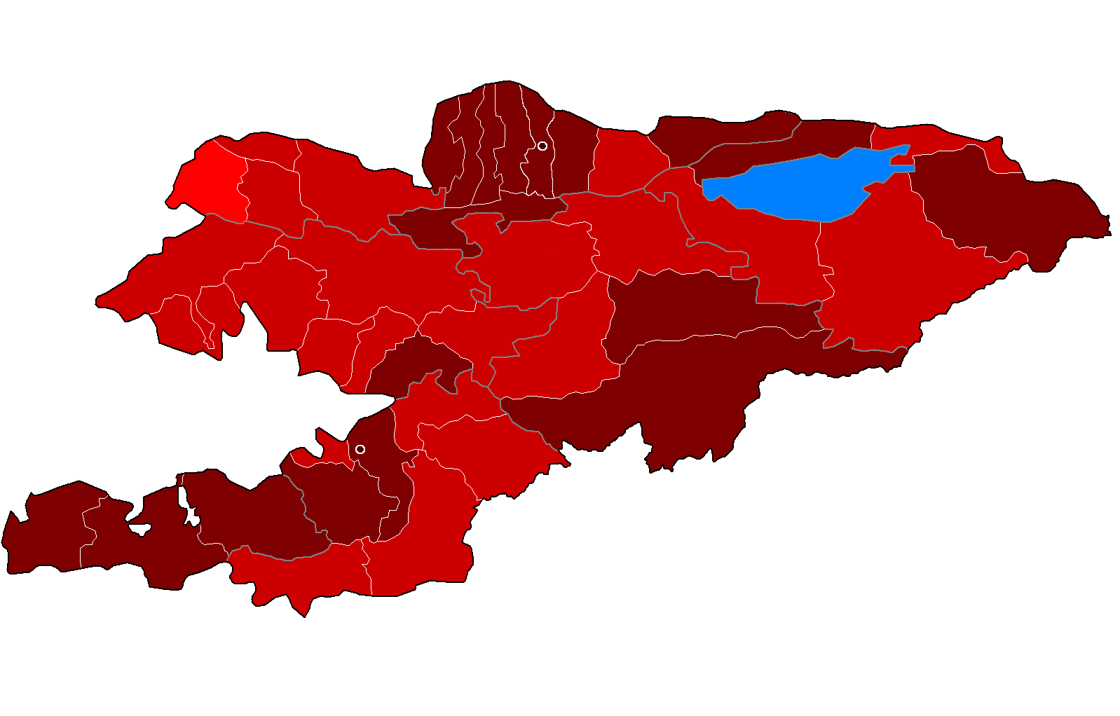 Кыргызча: Кыргызстандын, аймактарында катталган эң аз дегенде бир SARS-CoV-2 илдети Өкмөттүн расмий сайты: [1] Жугузгандардын саны 1-9 Жугузгандардын саны 10-99 Жугузгандардын саны 100-999 Жугузгандардын саны 1000-9999 Жугузгандардын саны 10000-99999